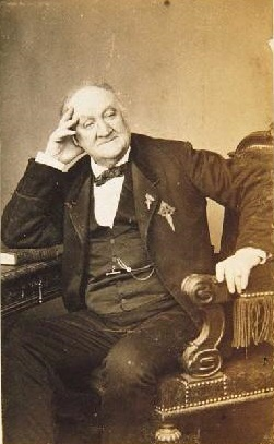 Joaquín Barroeta Aldamar, fotografía de J. Laurent. Museo de Historia de Madrid